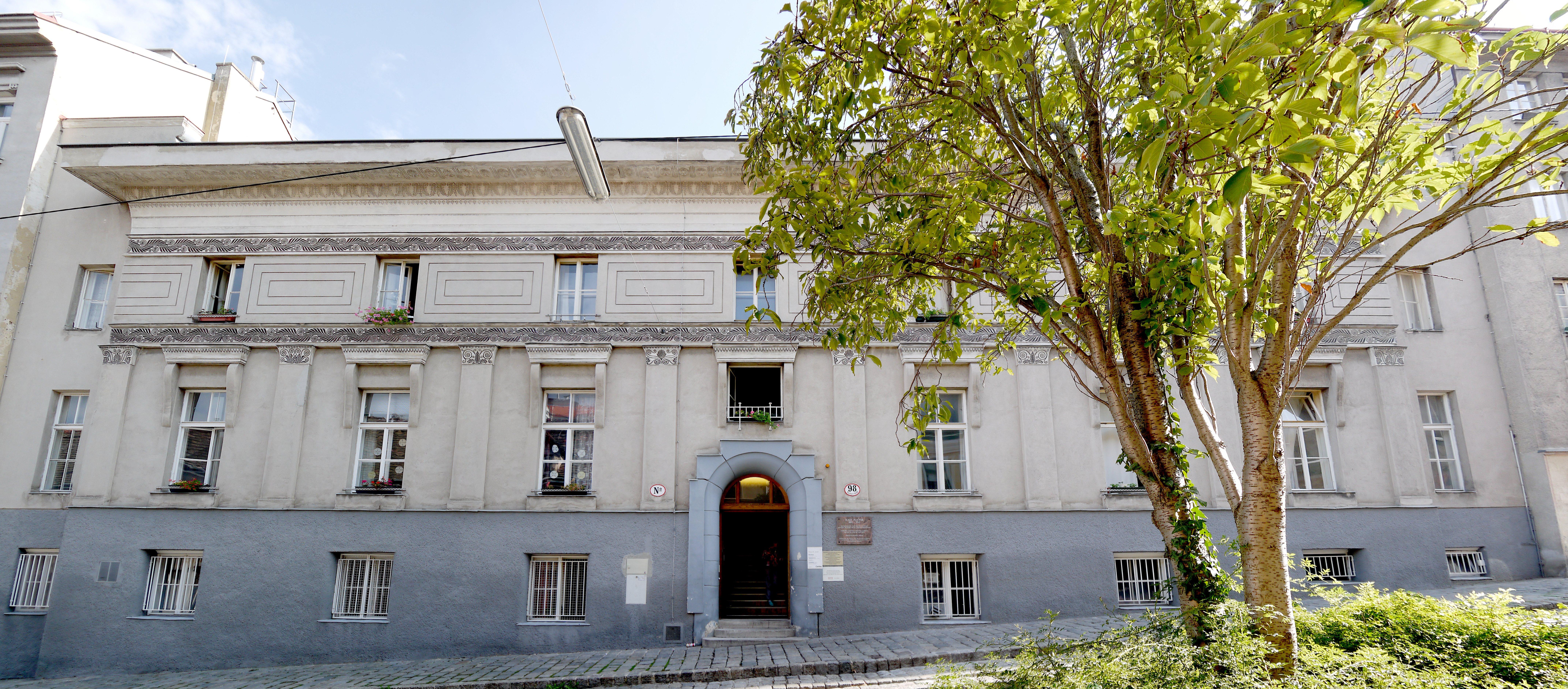 Caritas-Haus St. Josef